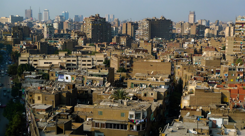 Le Caire